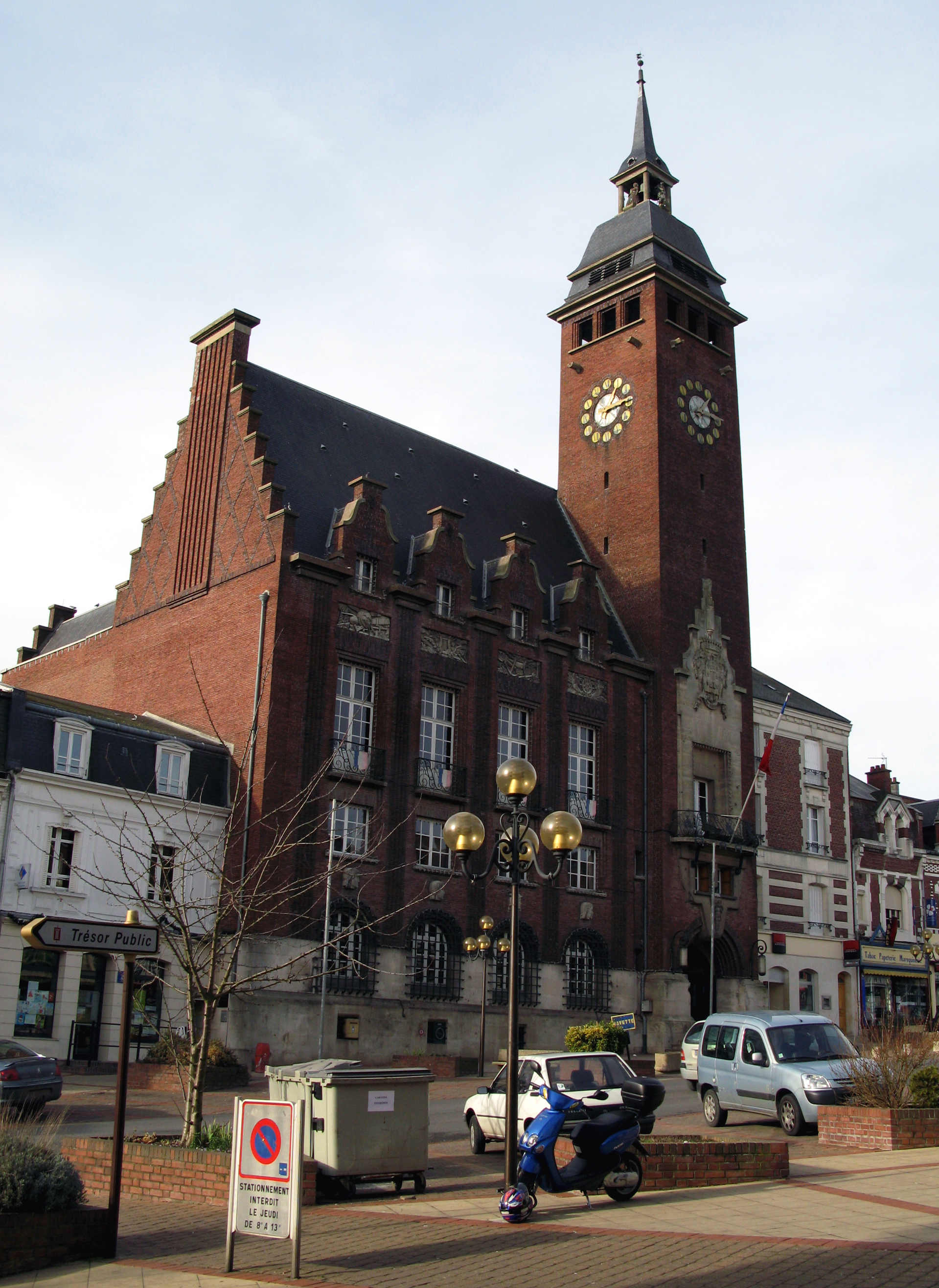 Montdidier (Somme, France) - L'Hôtel-de-ville. Juste à gauche, se trouve l'Office du Tourisme (façade blanche et toit d'ardoises). .